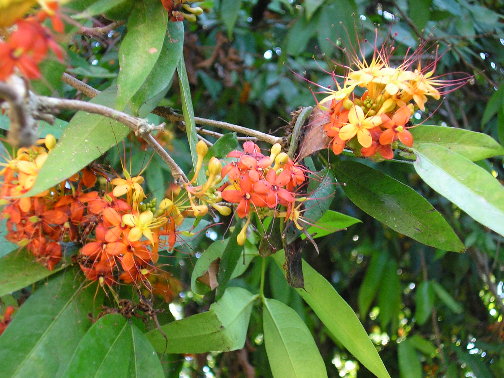 Saraca indica, arbre en fleurs en forêt du Laos